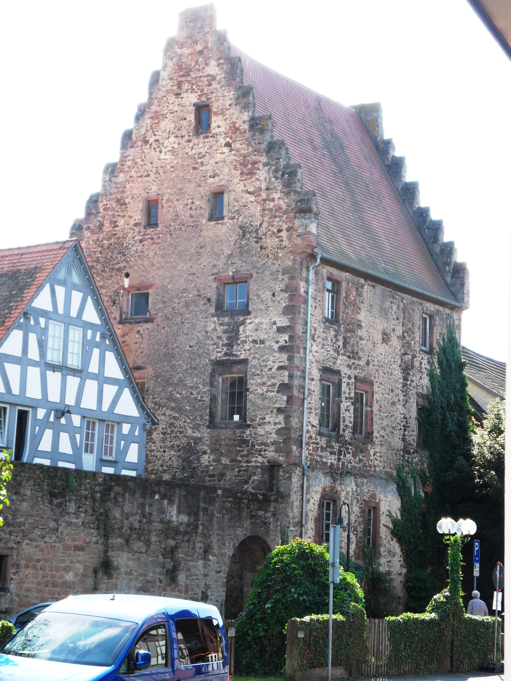 Denkmalgeschütztes „Steinernes Haus“, auch „Templerhaus“ genannt, Im Städtel 15 a in Erbach (Odenwald), erbaut 1379 als Burgmannenhaus. Hier die am Städtelbering errichtete Nordseite und die Ostseite mit dem markantem Treppengiebel.